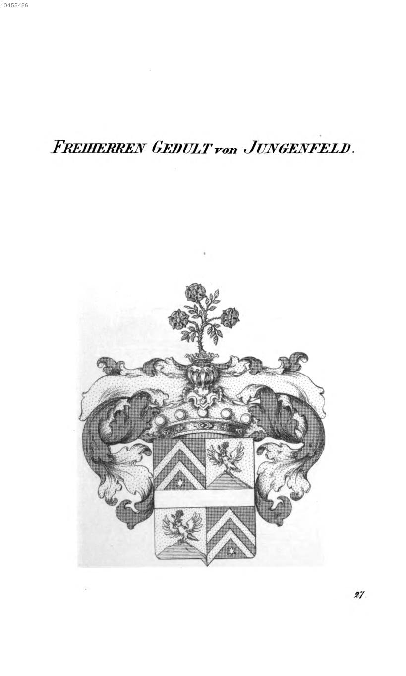 Wappen Gedult von Jungenfeld - Tyroff AT.jpg